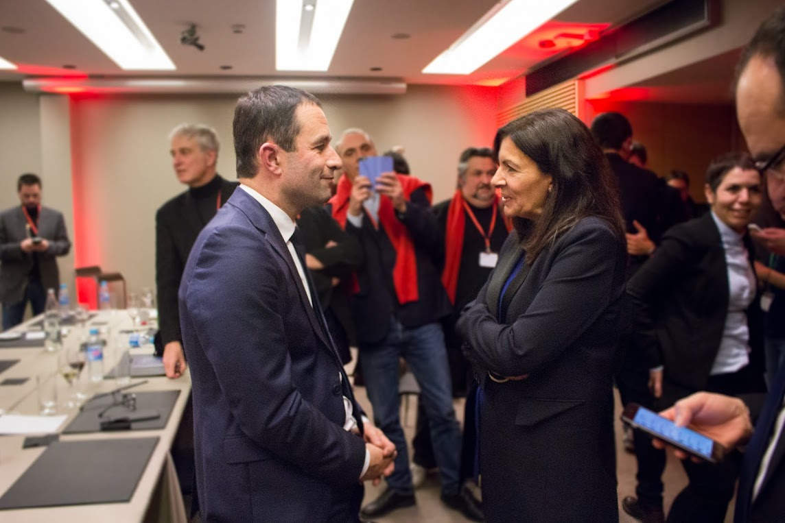 Benoit Hamon félicité par la maire de Paris Anne Hidalgo le soir du second tour de la primaire à la Maison de la Mutualité.